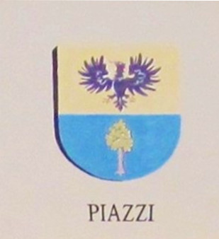 Cognomi storici dei Vicini che discendono dalle famiglie della Regola che abitavano a Predazzo e riguardano 19 cognomi: Boninsegna, Bonora, Bosin, Brigadoi, Defrancesco, Degaudenz, Dellagiacoma, Dellantonio, Dellasega, Demartin, Dezulian, Felicetti, Gabrielli, Giacomelli, Guadagnini, Morandini, Nicolao, Piazzi e Zanna.